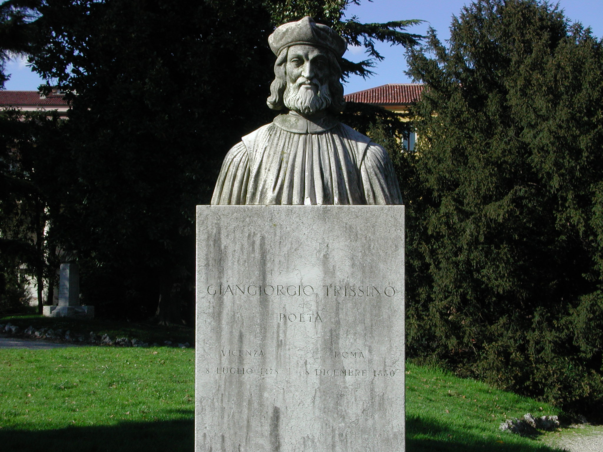 Foto del Monumento dedicato a Giangiorgio Trissino in Vicenza nel 1978